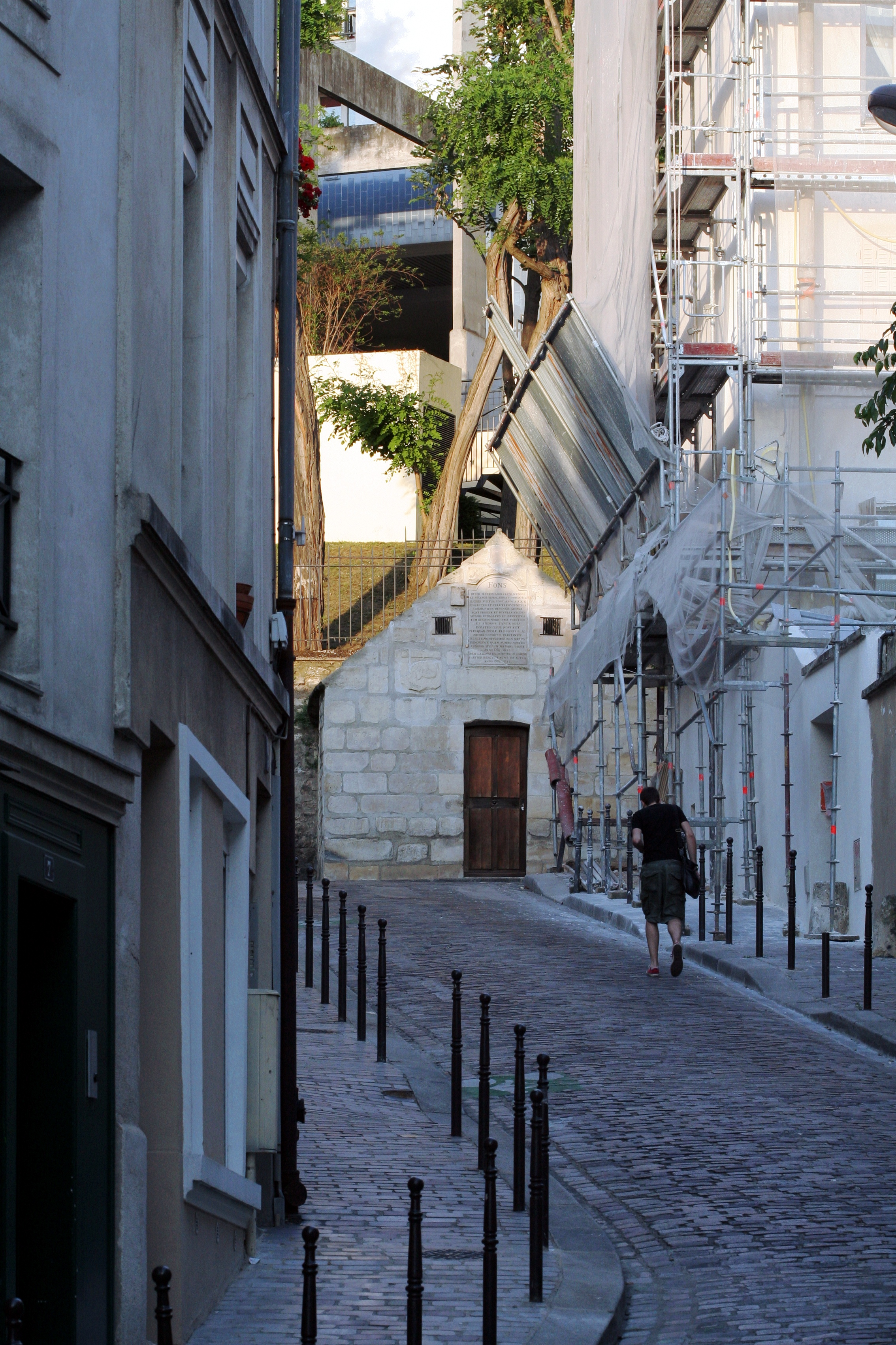 Regard Saint-Martin (ou regard des des Petites-Rigoles), 42 rue des Cascades, Paris 20e arrdt, vu depuis la rue de Savies.